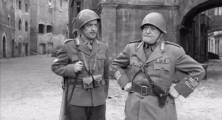 Screenshot del film I due colonnelli Fonte: copia privata dell'utente